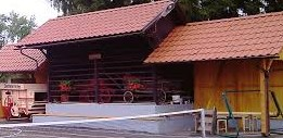 Na sliki je igrišče in okolica v vasi Telče.